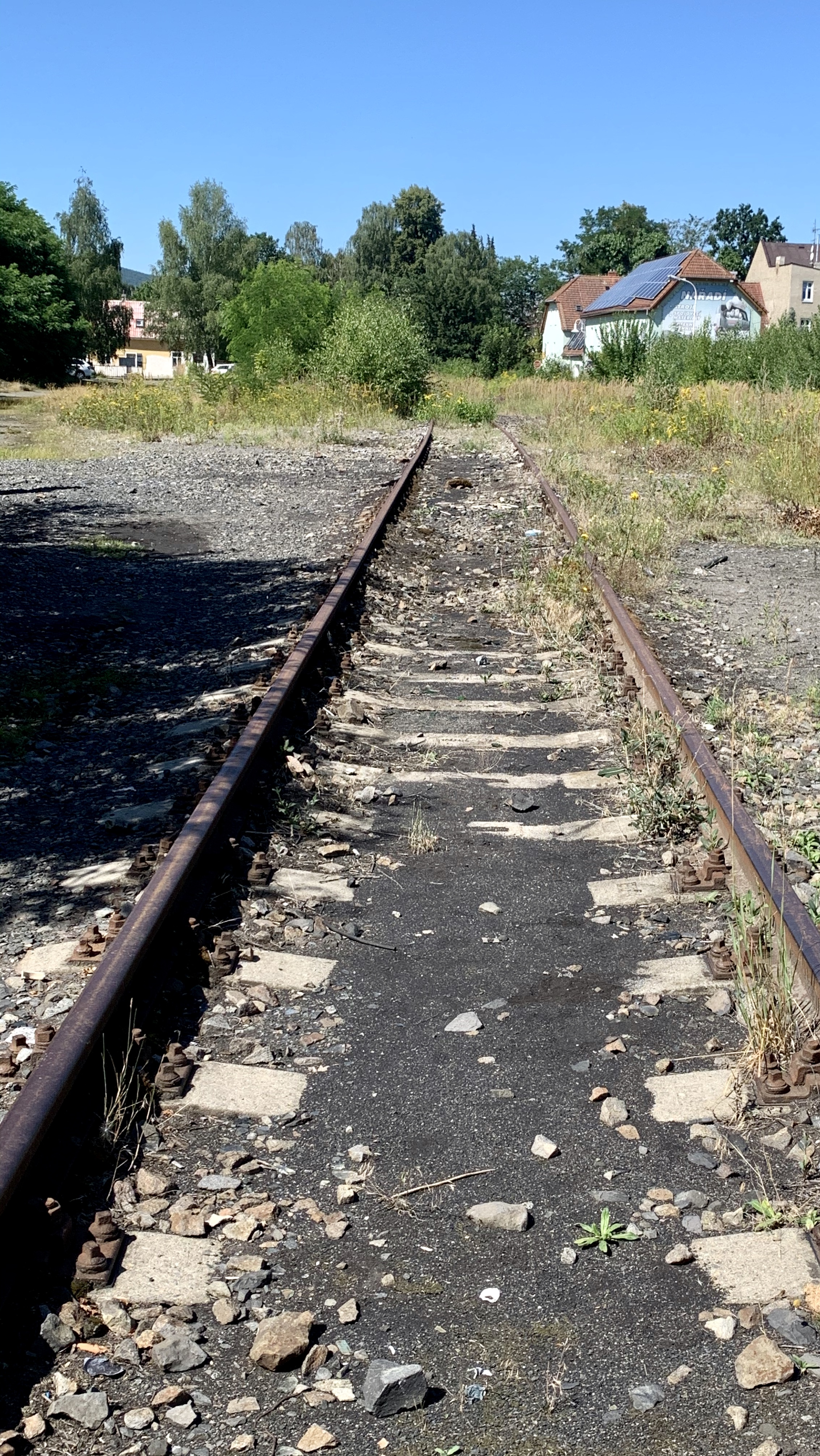 Jedna z dochovaných a slepých kolejí v areálu. Tato však nevypadá tak dezolátně.